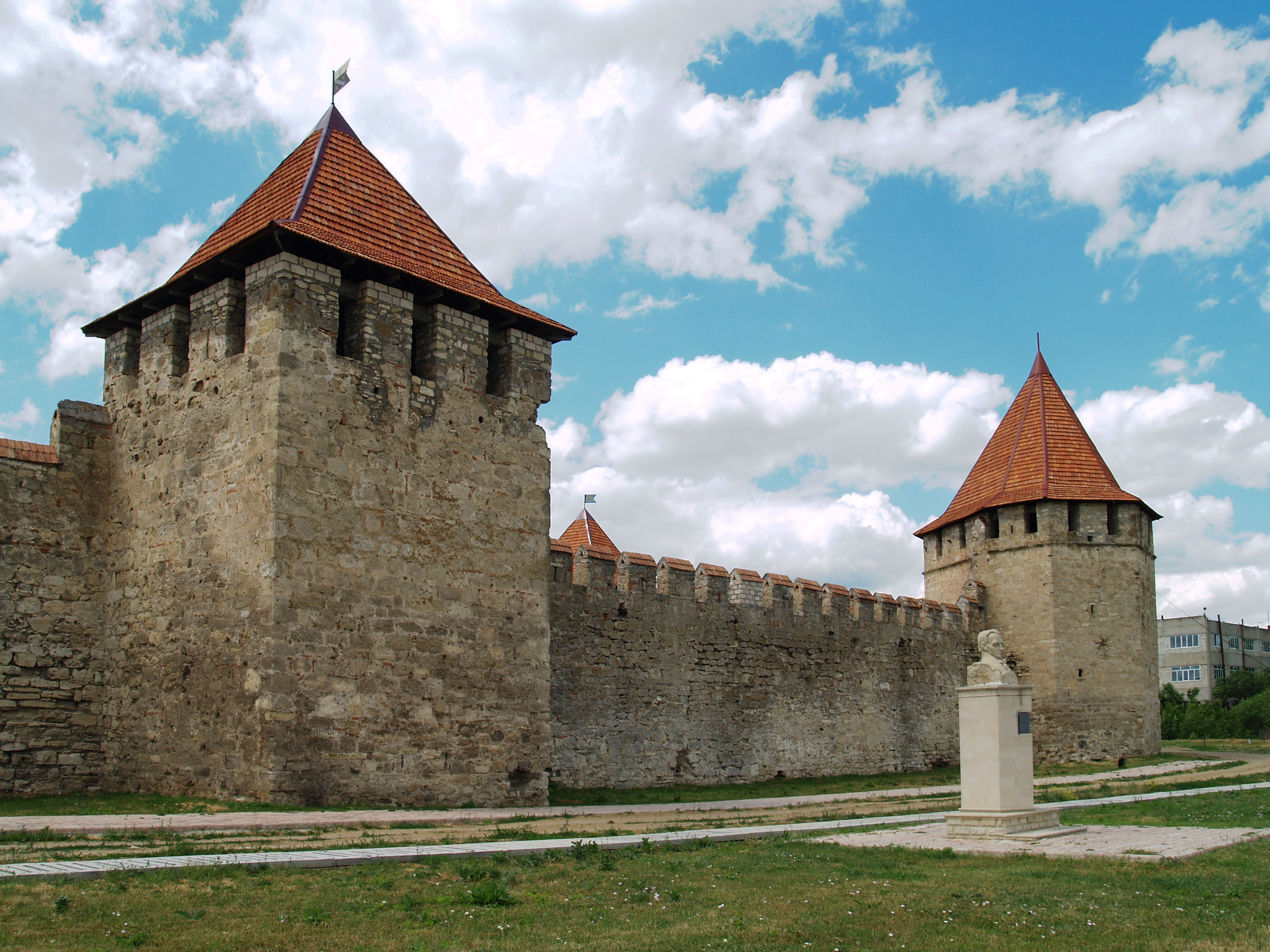 North-east corner of Bender Fortress.